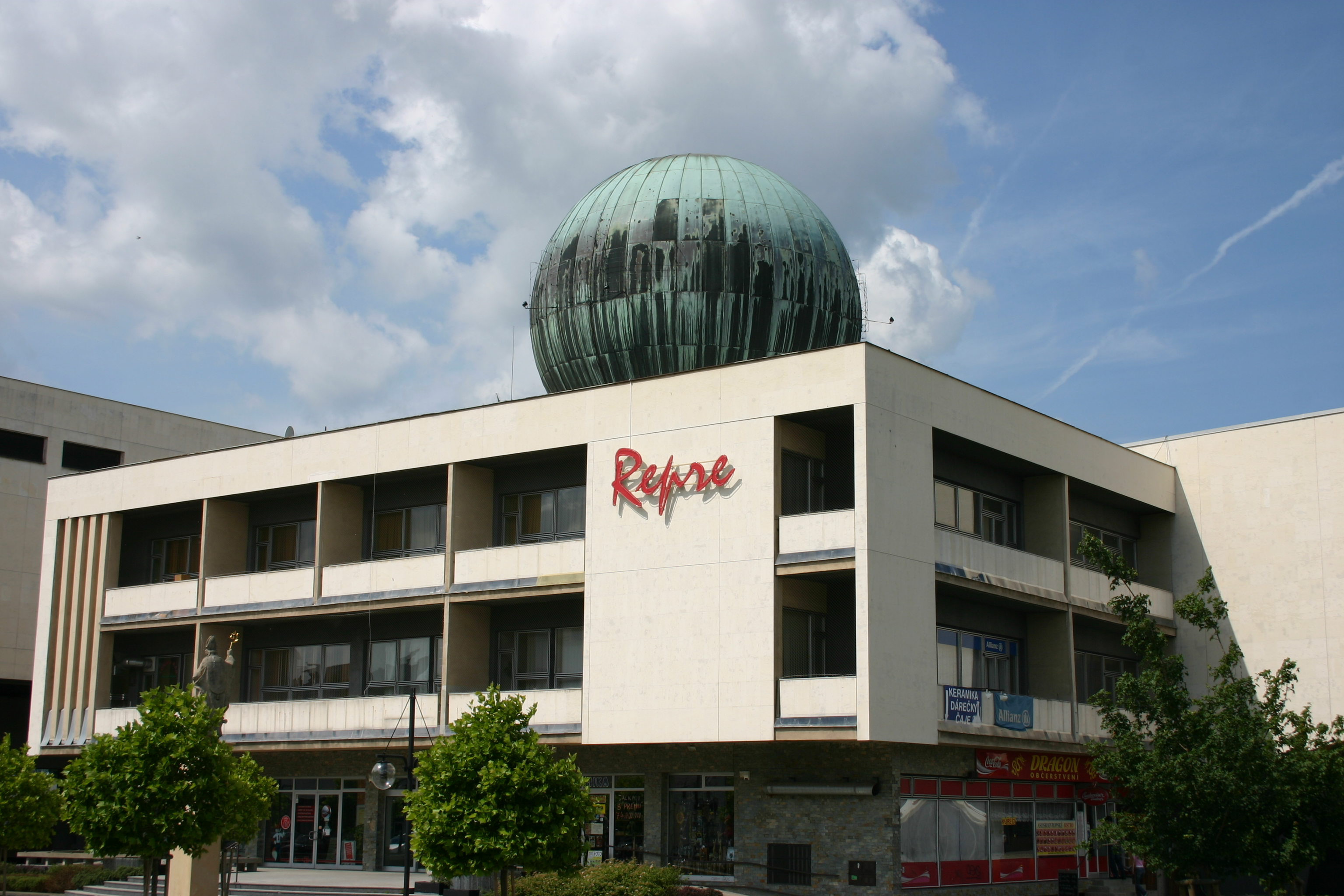 Planetárium v Mostě